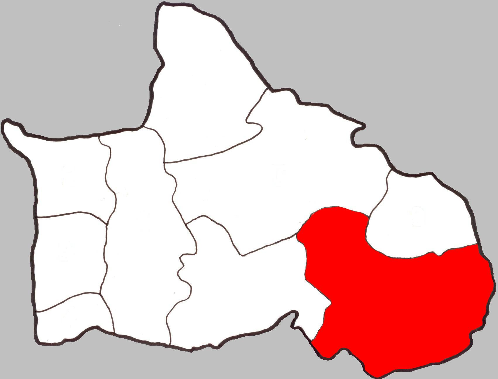 Map of Tambon Noen Kum, Bang Krathum, Phitsanulok, Thailand